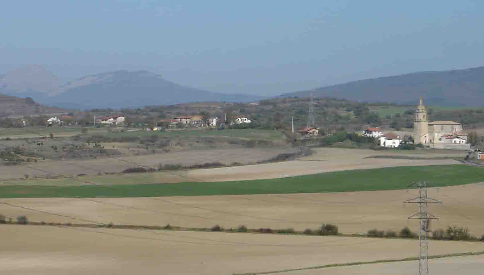 Panorámica del pueblo de Betolaza. Álava. España